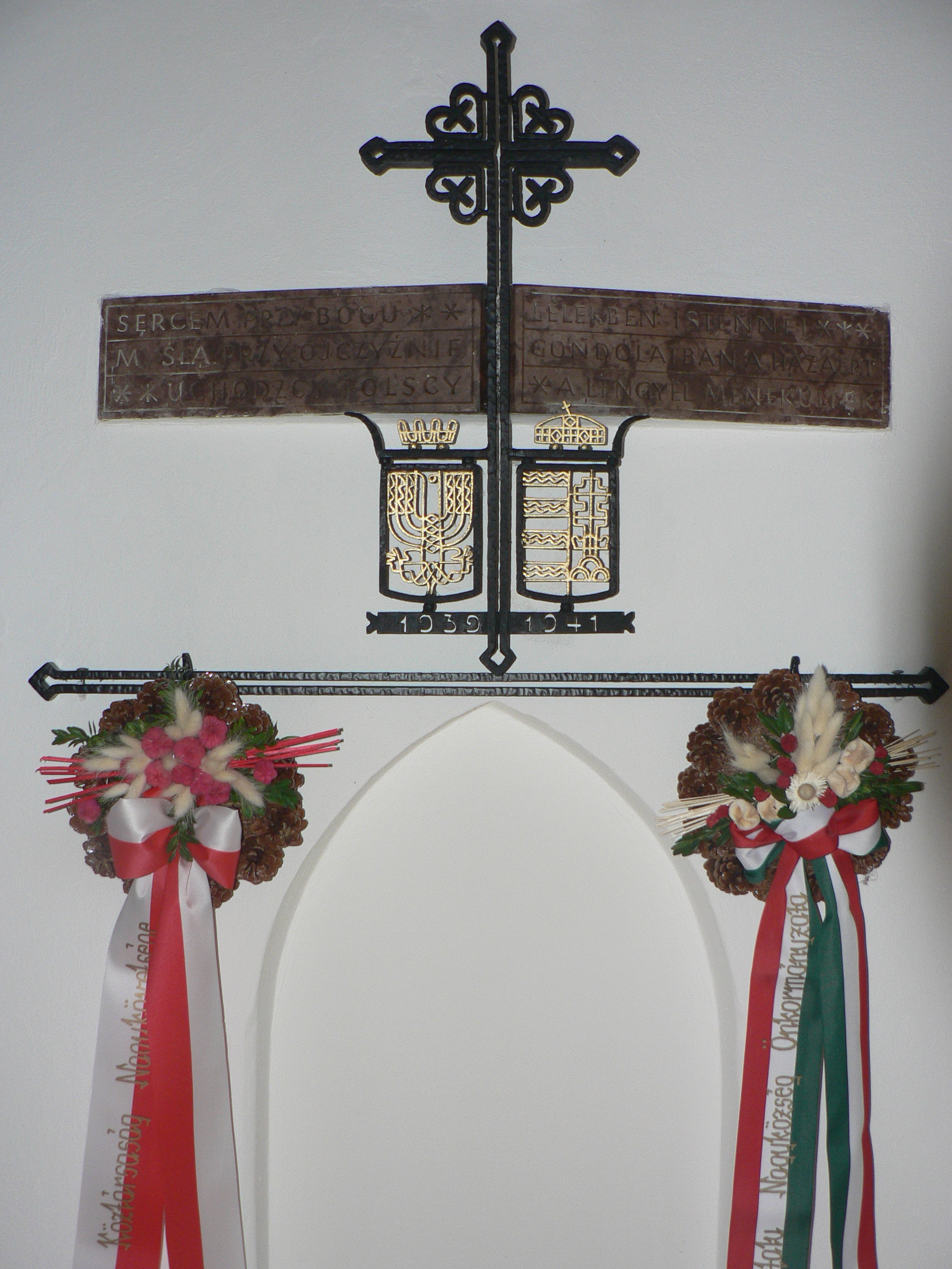 Az 1939-es lengyel menekültek befogadásának emlékére ("Lélekben Istennel - gondolatban a hazáért")